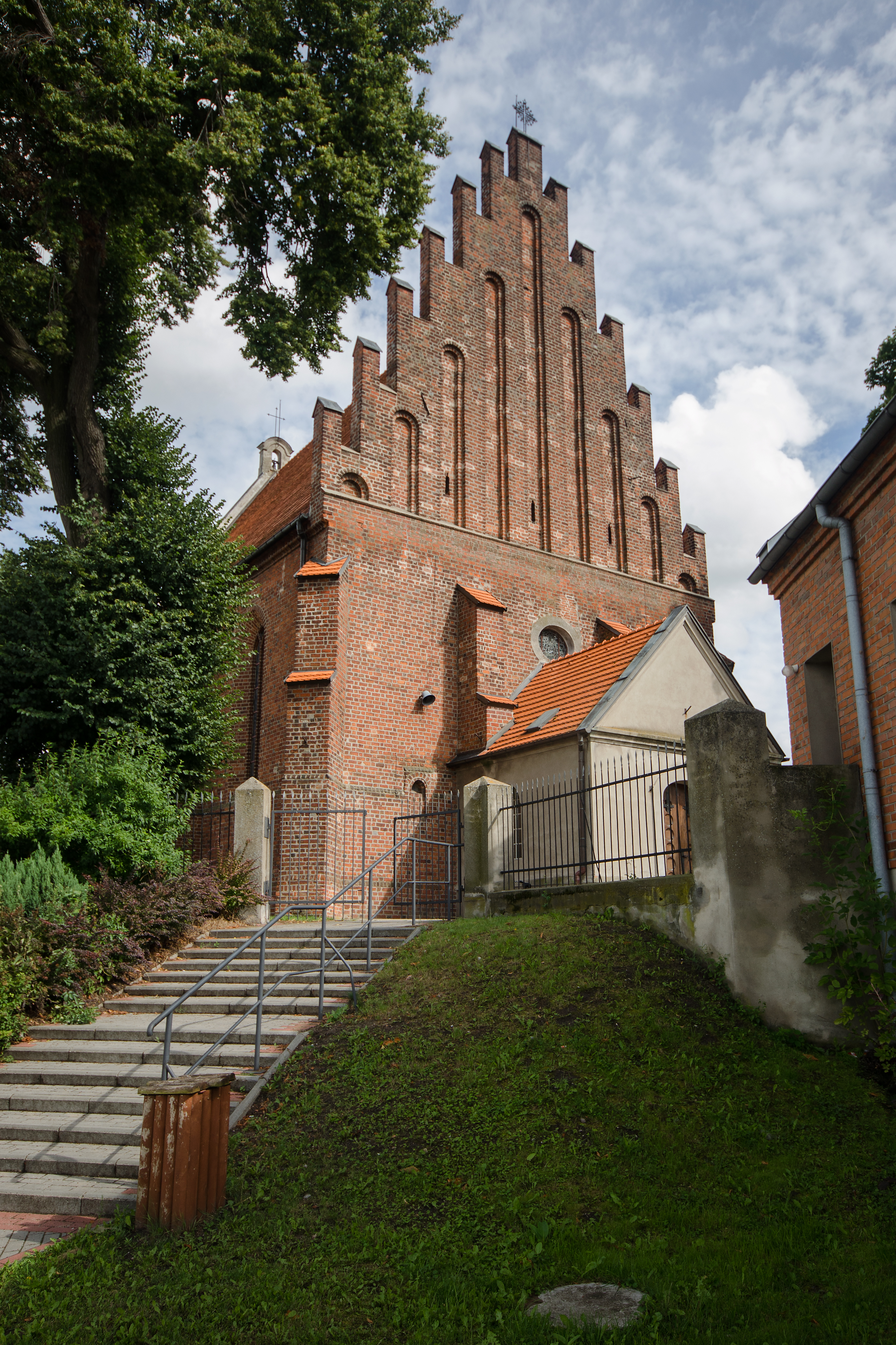 Kleczew, kościół par. p.w. św. Andrzeja Apostoła, 2 poł. XIV, pocz. XVI, 1866-1872, 1905